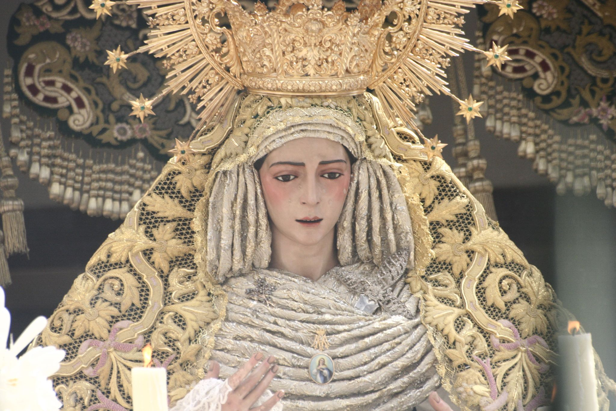 Virgen del Rocío. Semana Santa en Sevilla. Año 2006 Foto realizada y propiedad de Ángel Chacón